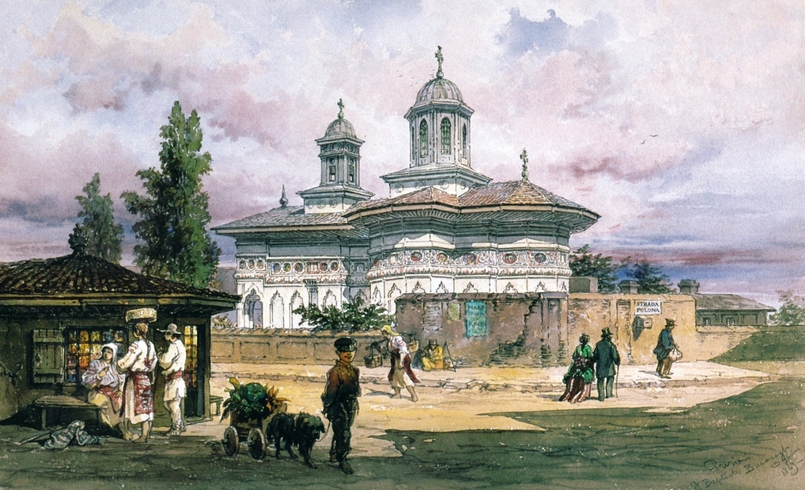 an aquarelle by Amedeo Preziosi; Biserica Batişte, Polonă Street (Cuckoo's marketplace), Bucharest, 1869